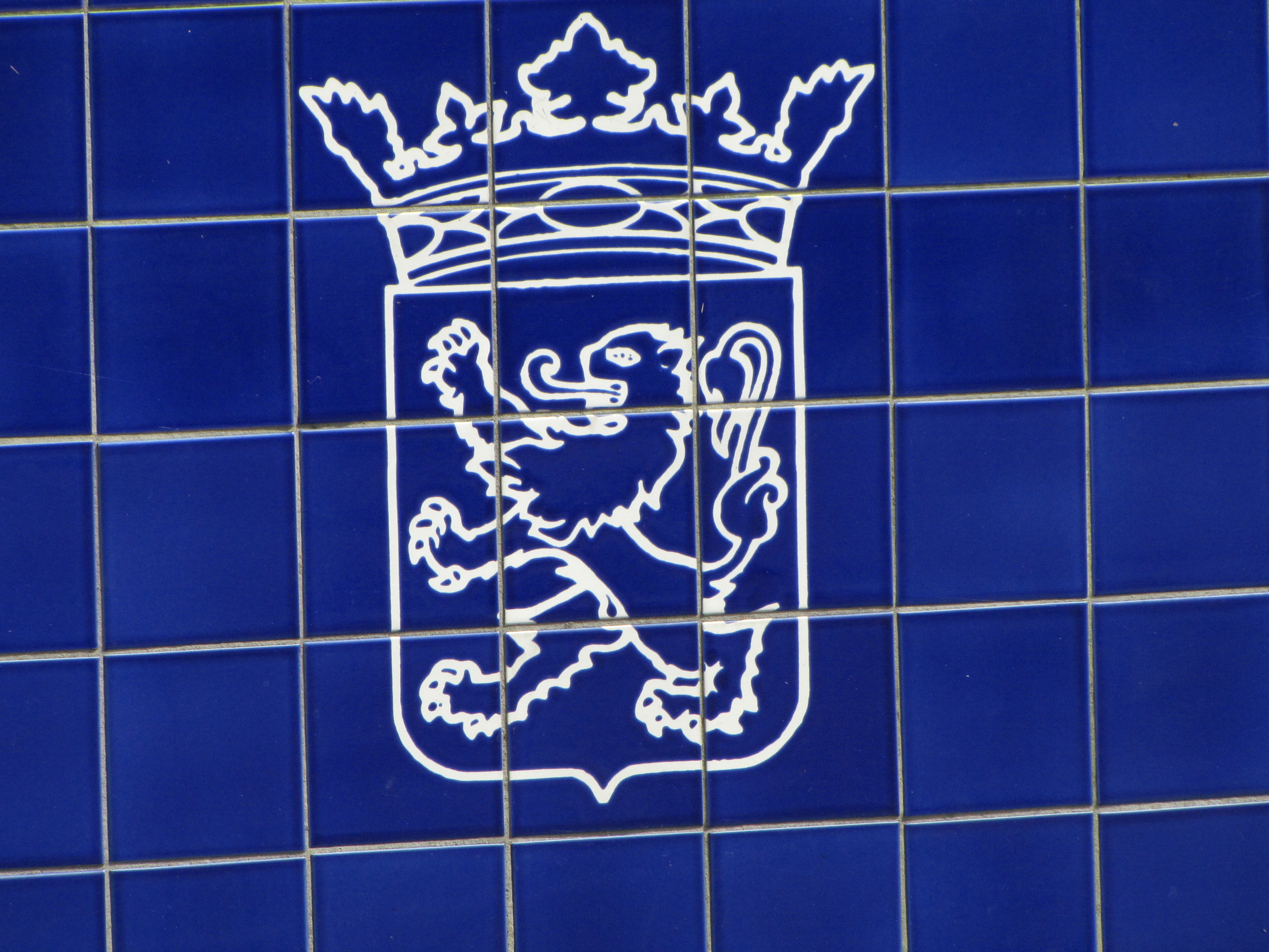 Denkmal für die Elf-Städte-Tour in Friesland, gelegen bei Giekerk (Gemeinde Tietjerksteradeel). Das Denkmal ist eine Brücke, die mit blau-weißen Kacheln bedeckt ist. Von weitem sieht man Schlittschuhläufer, von nahem erkennt man, dass die Kacheln jeweils einen Schliffschuhläufer abbilden, der historisch an einer Elf-Städte-Tour teilgenommen hat.